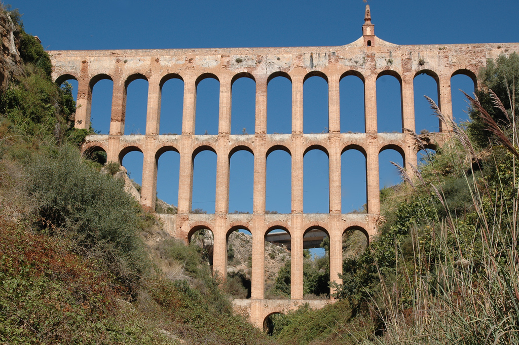 Aqueduc d'alimentation en eau aux alentours de la ville de Nerja (Andalousie)- EspagneAqueduc d'alimentation en eau aux alentours de la ville de Nerja (Andalousie)- Espagne